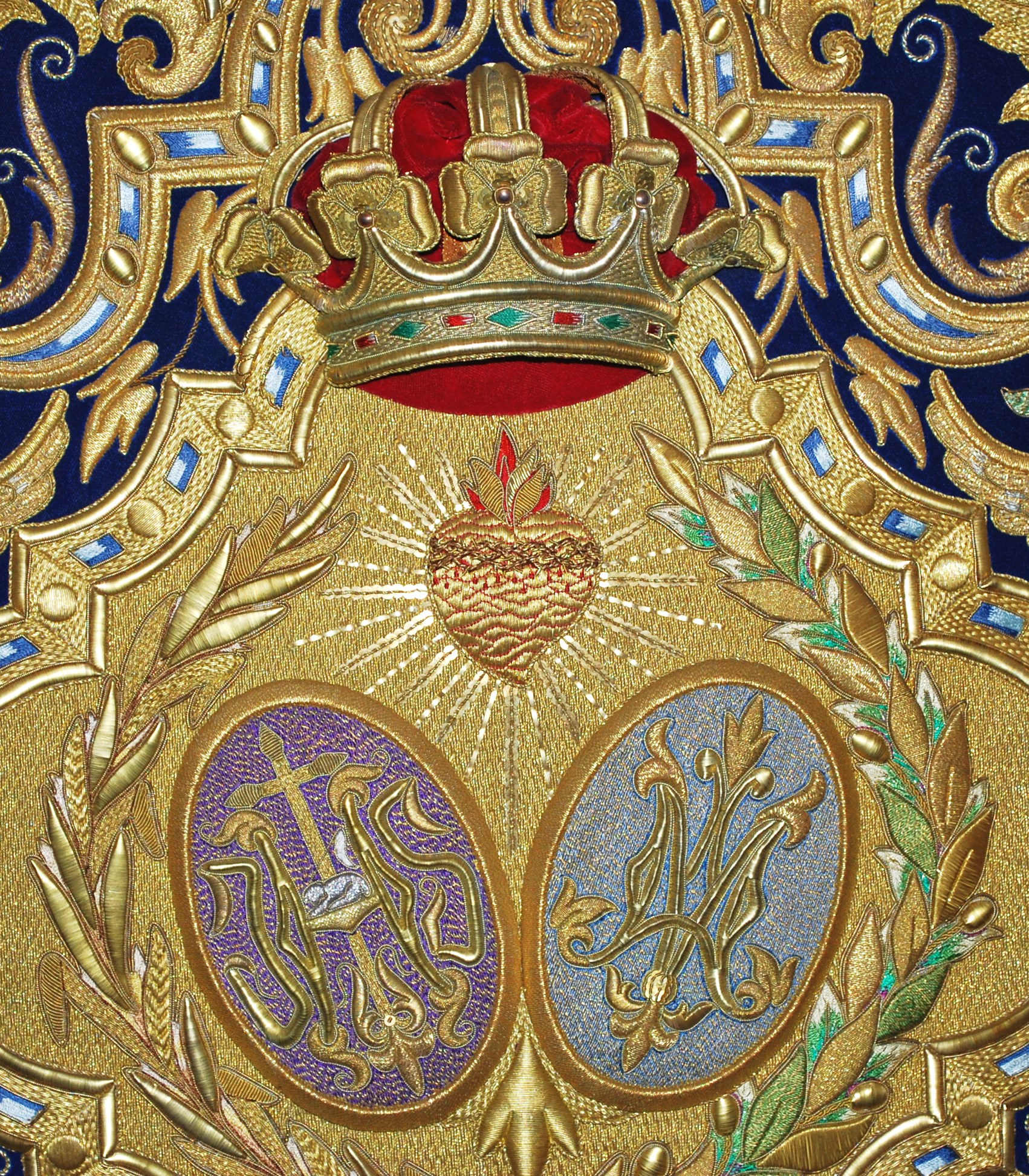 Detalle del Estandarte de la Hermandad de la Victoria de Huelva